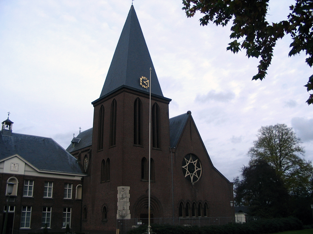 Description Zelf genomen foto van de abdijkerk te Heeswijk Vrij gebruik Zelf genomen foto van de abdijkerk te Heeswijk